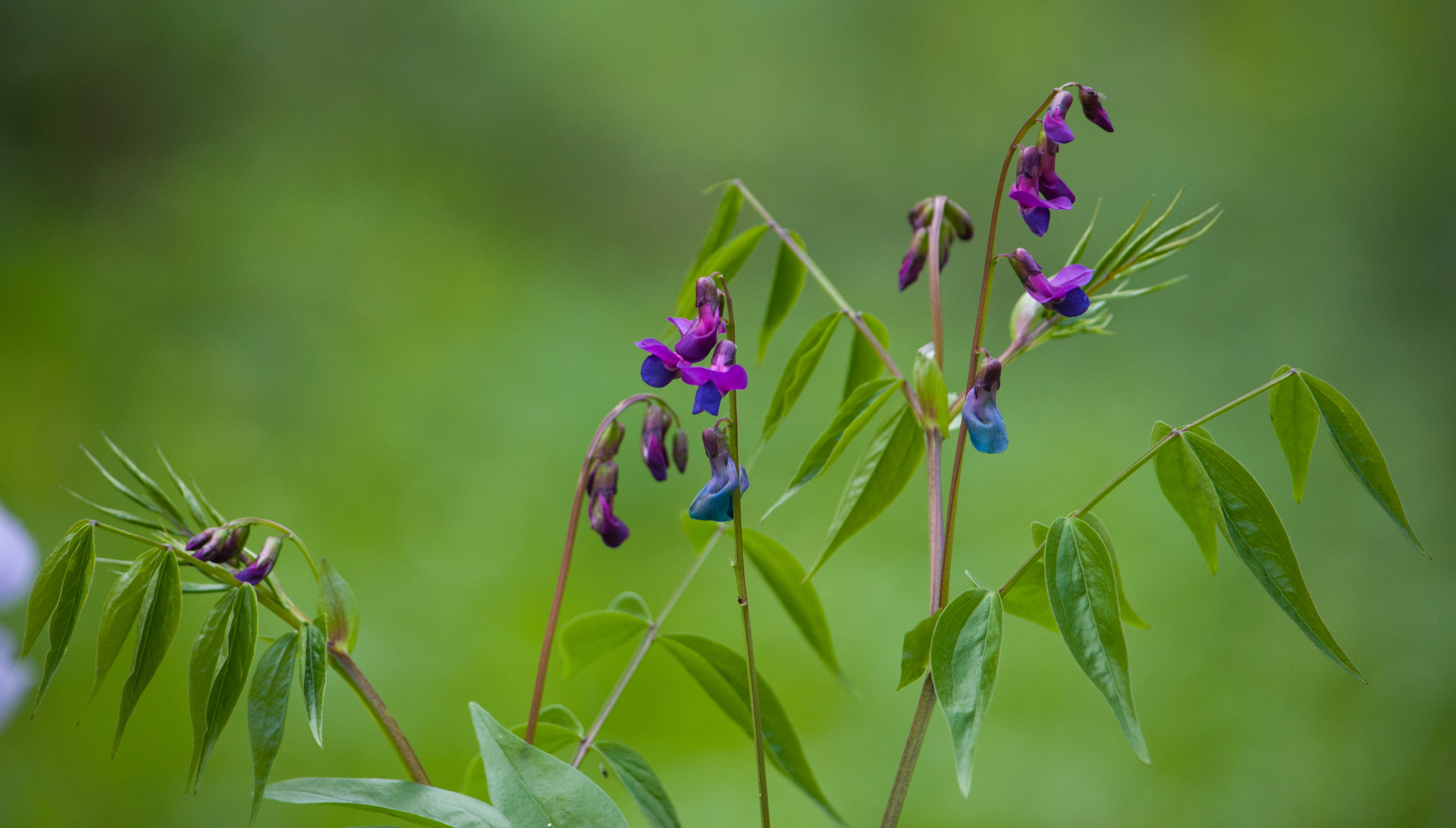 Урочище «Гощів», Обухівський район, Нещерівська та Старобезрадичівська сільські ради